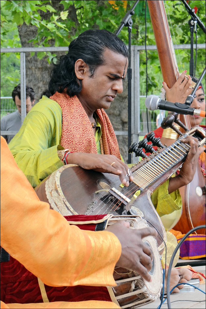 concert de Raghunath Manet à la veena site de l'artiste 12e Festival culturel du Tibet et des peuples de l’Himalaya